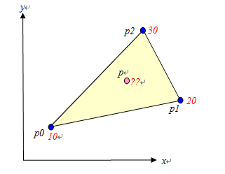 要素内補間の説明文